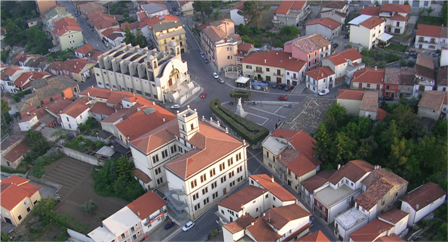 Sturno dall'alto